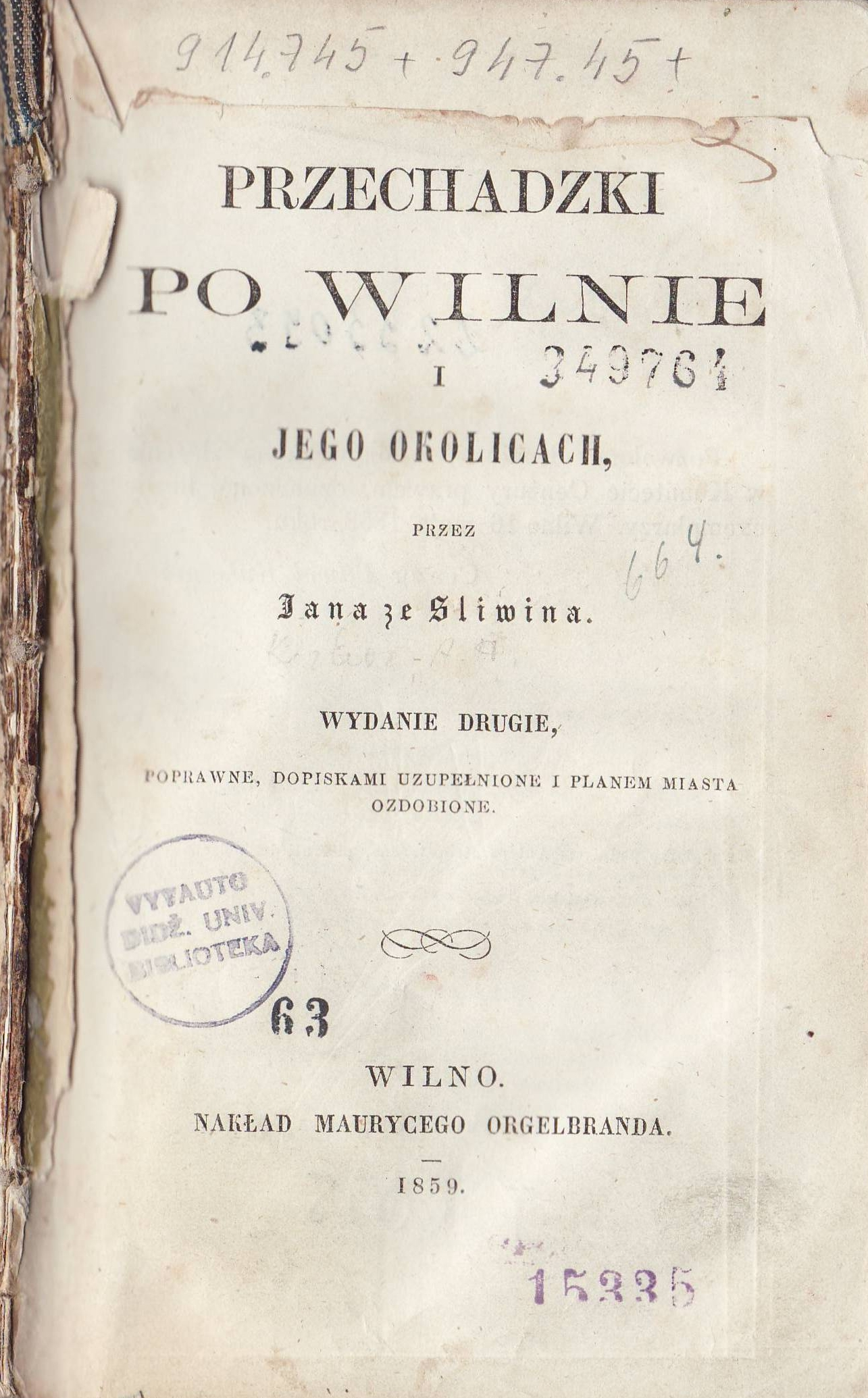 Jan ze Śliwina (real name A. H. Kirkor). Przechadzki po Wilnie i jego okolicach. Wyganie drugie, poprawione, dopiskami uzupełnione i planem miasta ozdobione. Wilno 1859. Title page